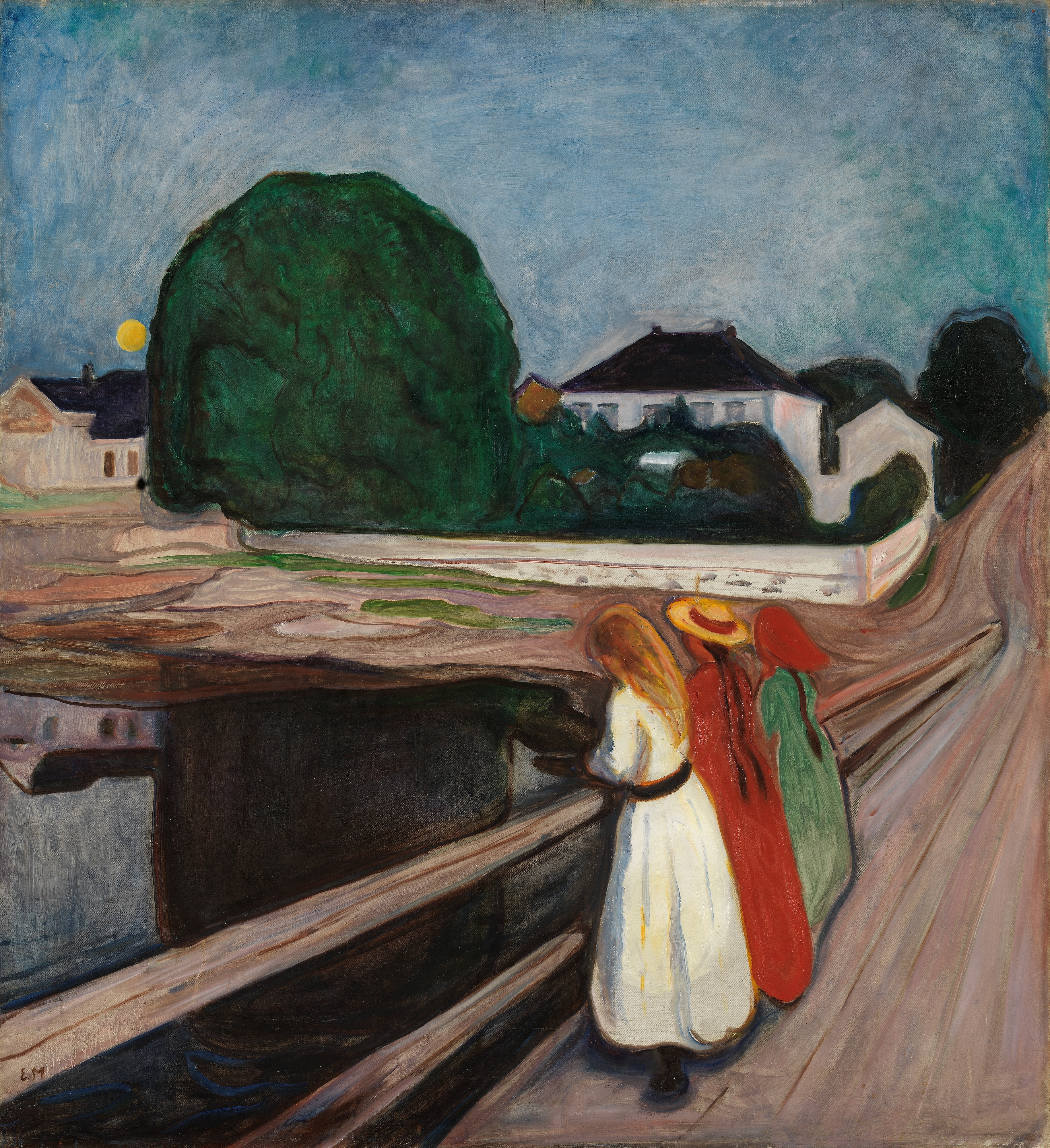 Gerd Woll: Edvard Munch - complete paintings : catalogue raisonné. Nr. 483